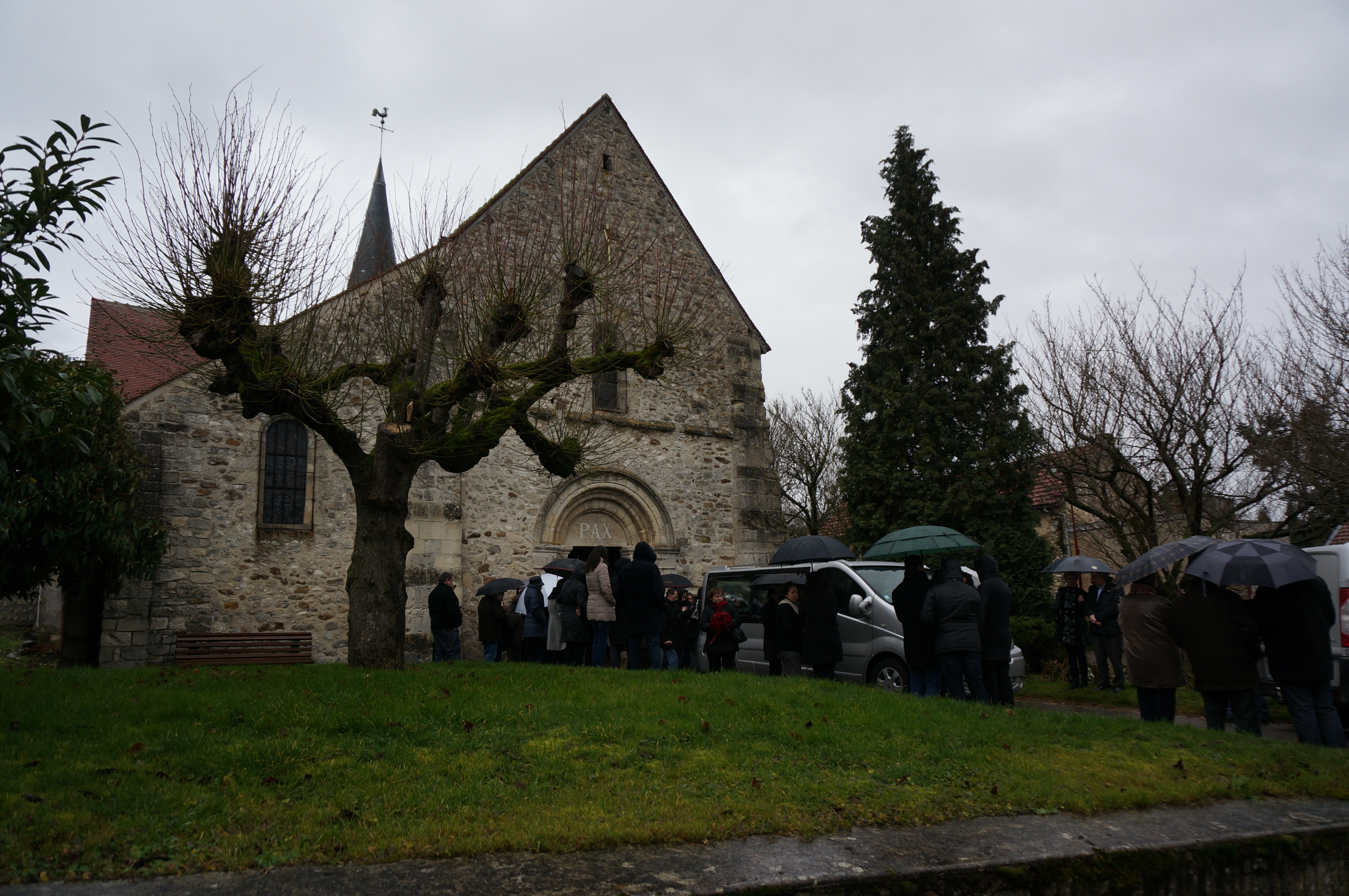 église du village.